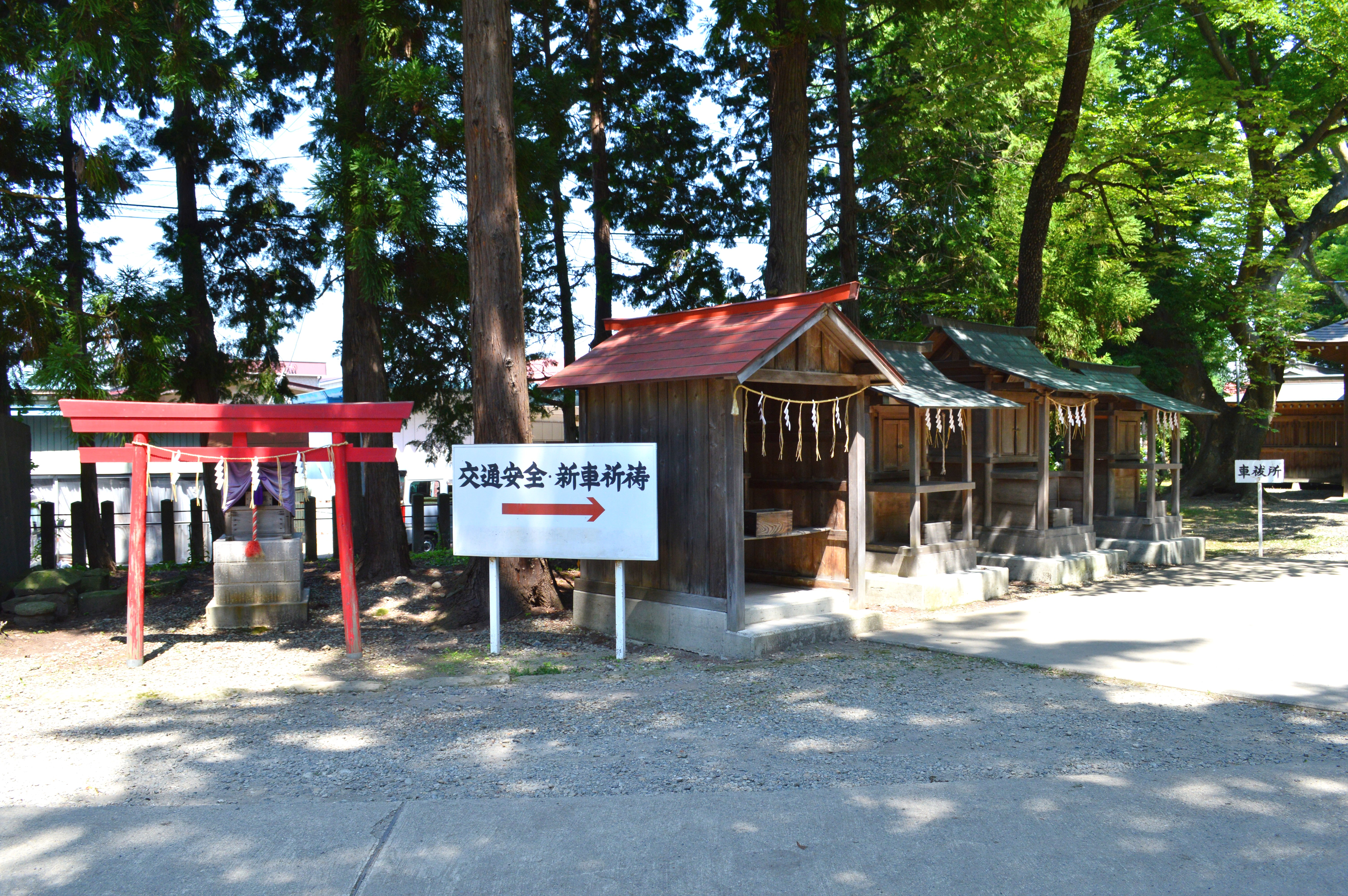 蚕養国神社 境内社